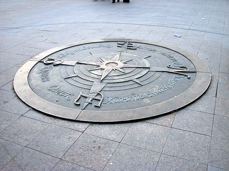 Круг-компас на Цветном бульваре в Тюмени.